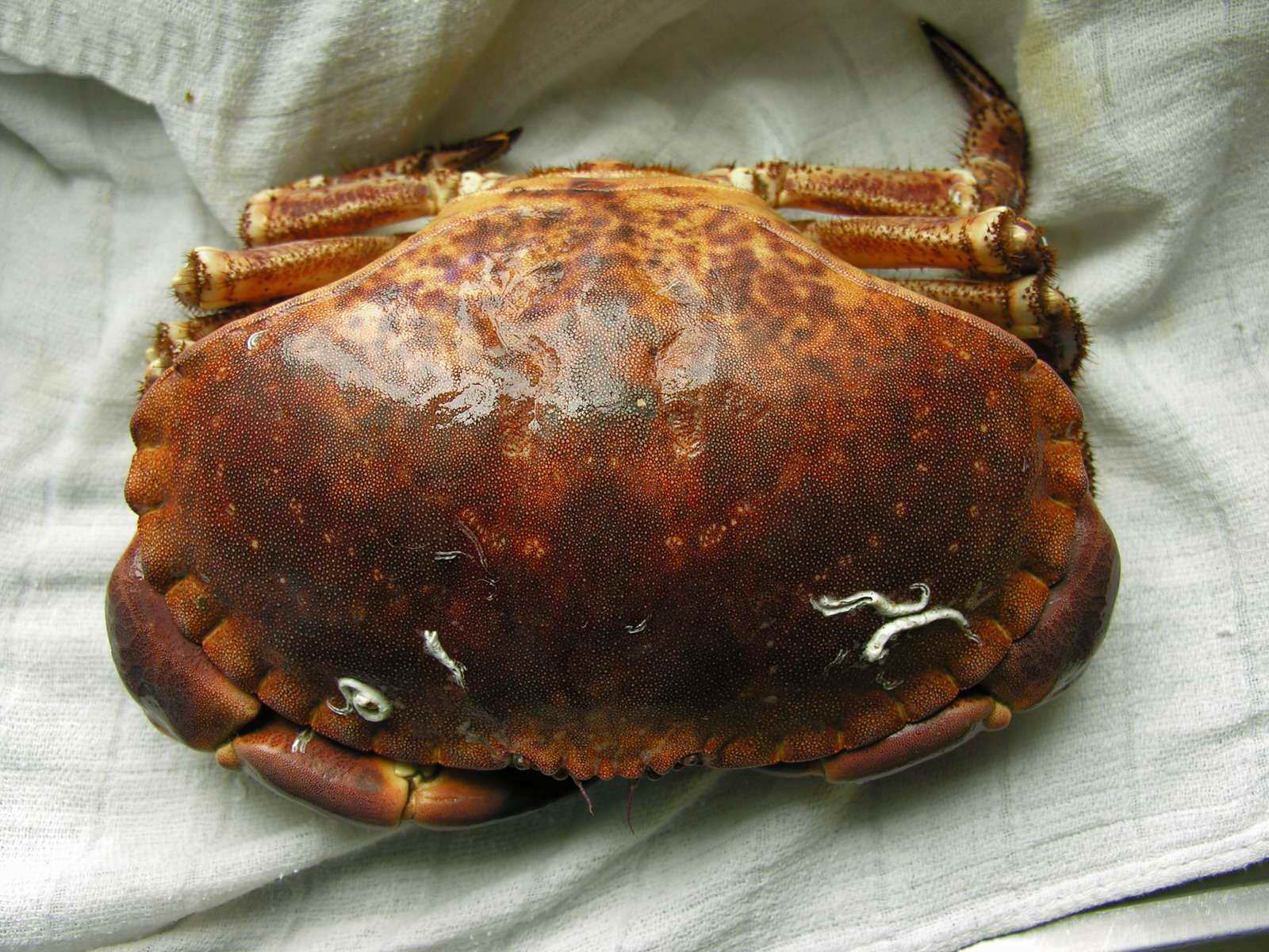 self made. Boiro - Galicia - Spain